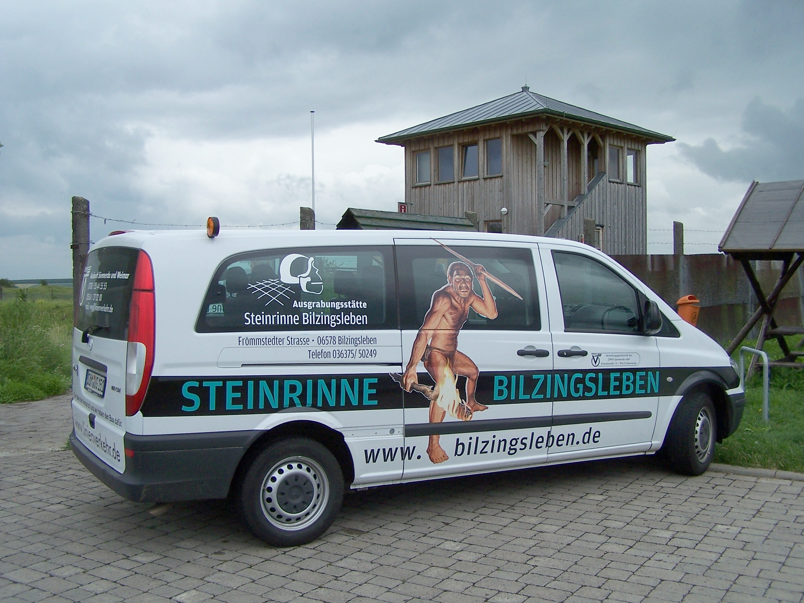 Bilzingsleben, Fundplatz Steinrinne, am Museum